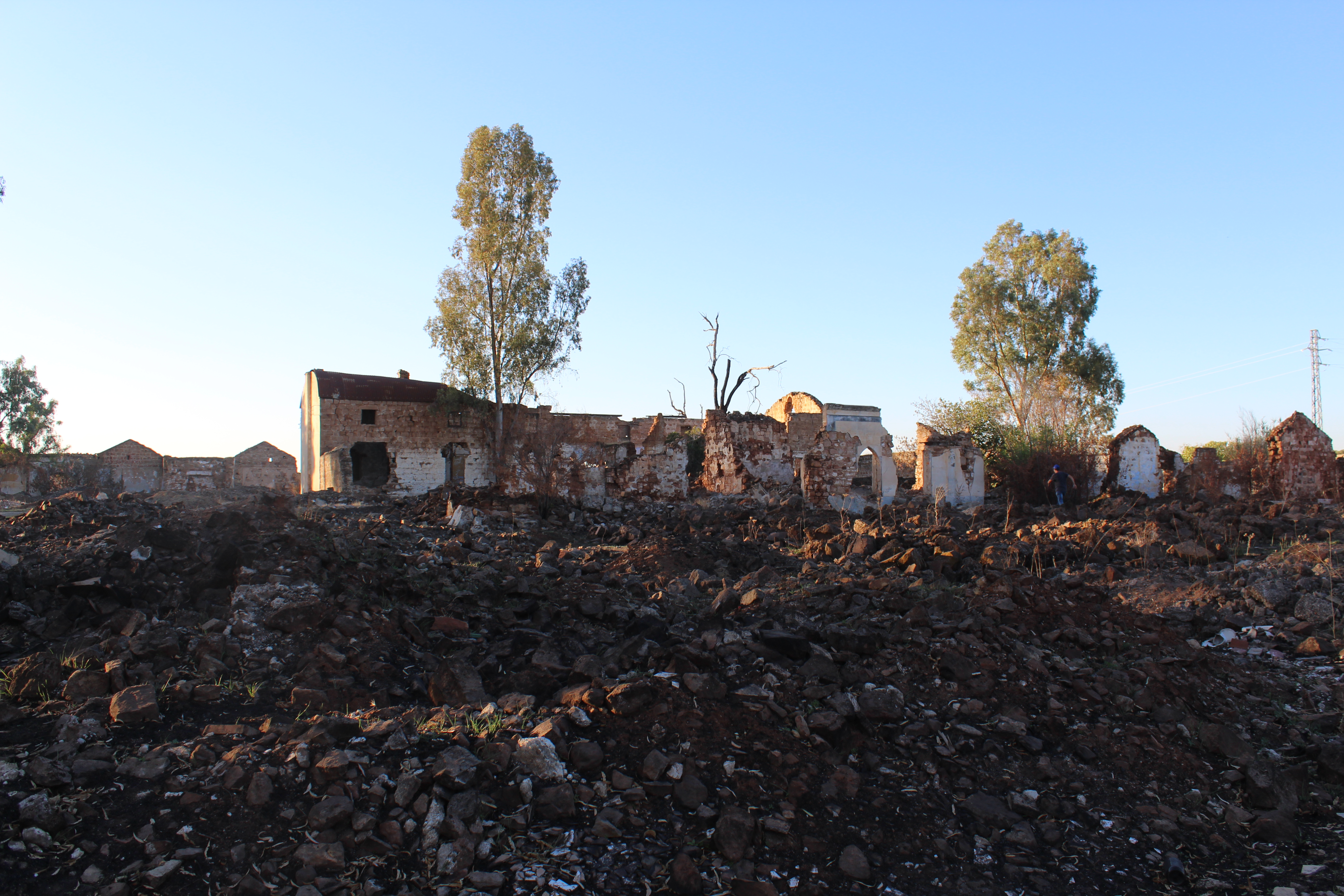 Vista de los restos del poblado de La Tortilla, donde se pueden apreciar las ruinas de la iglesia.